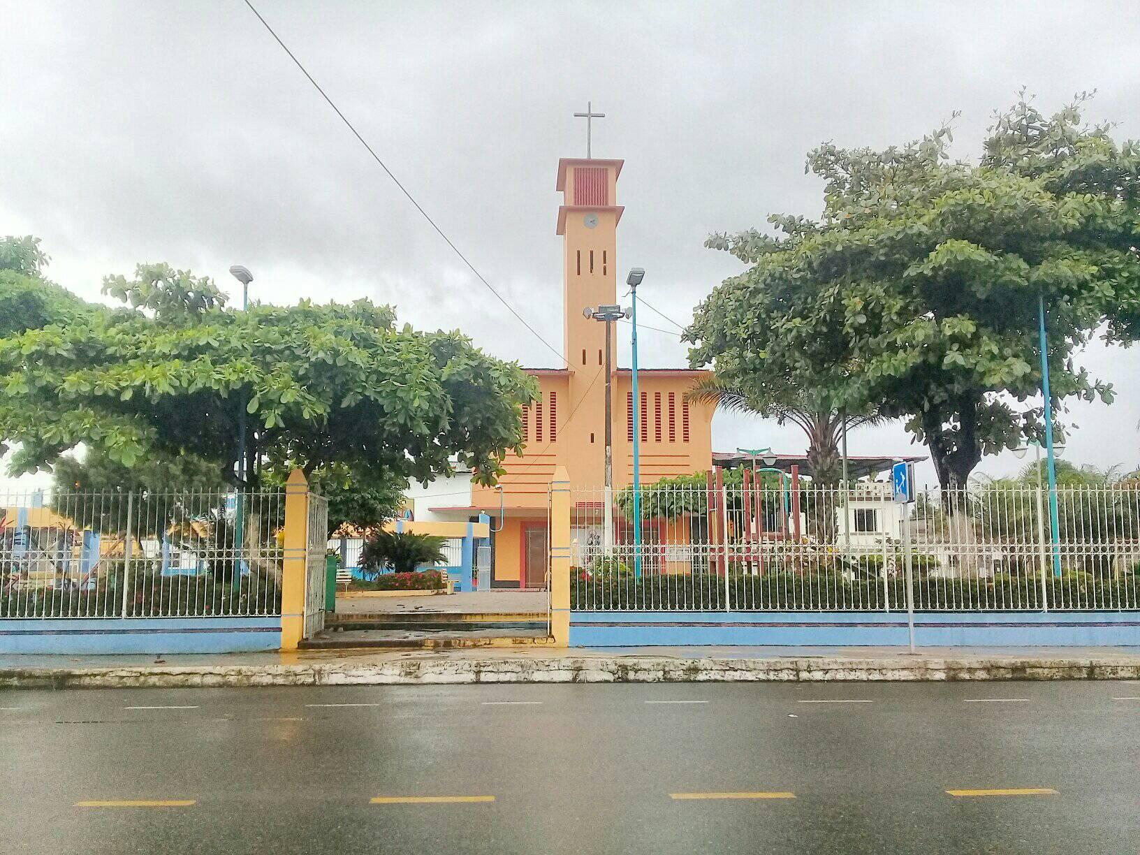 Parque central de Catarama.